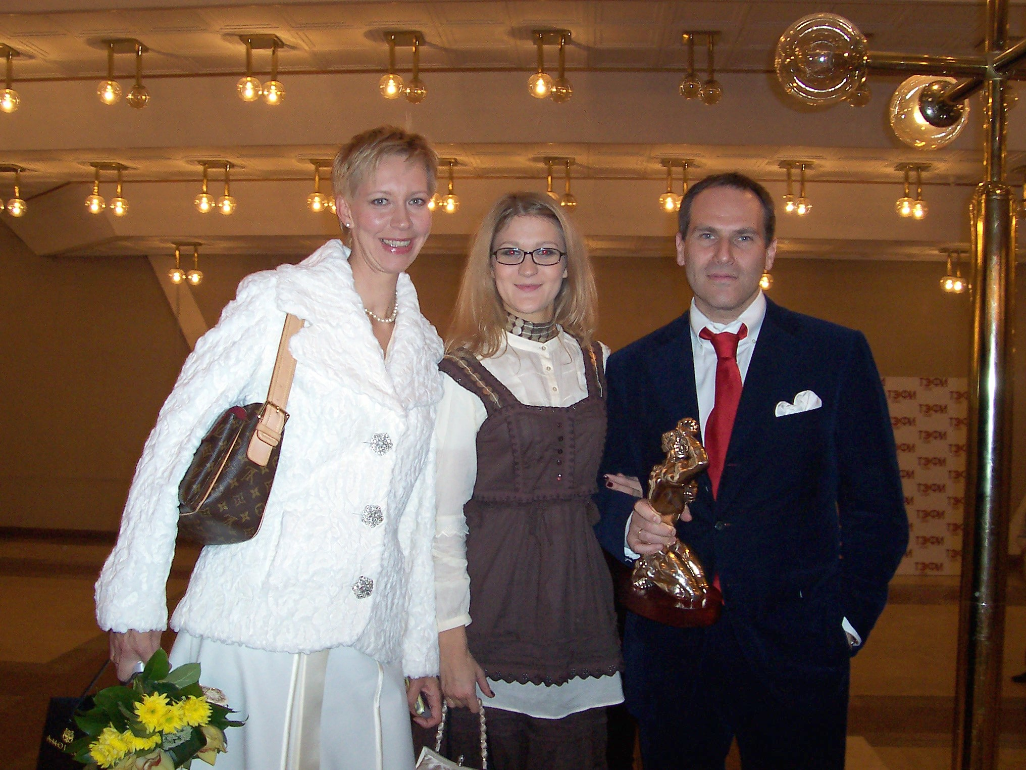 Шац, Лазарева и Белова на ТЭФИ 2006, собственная работа.